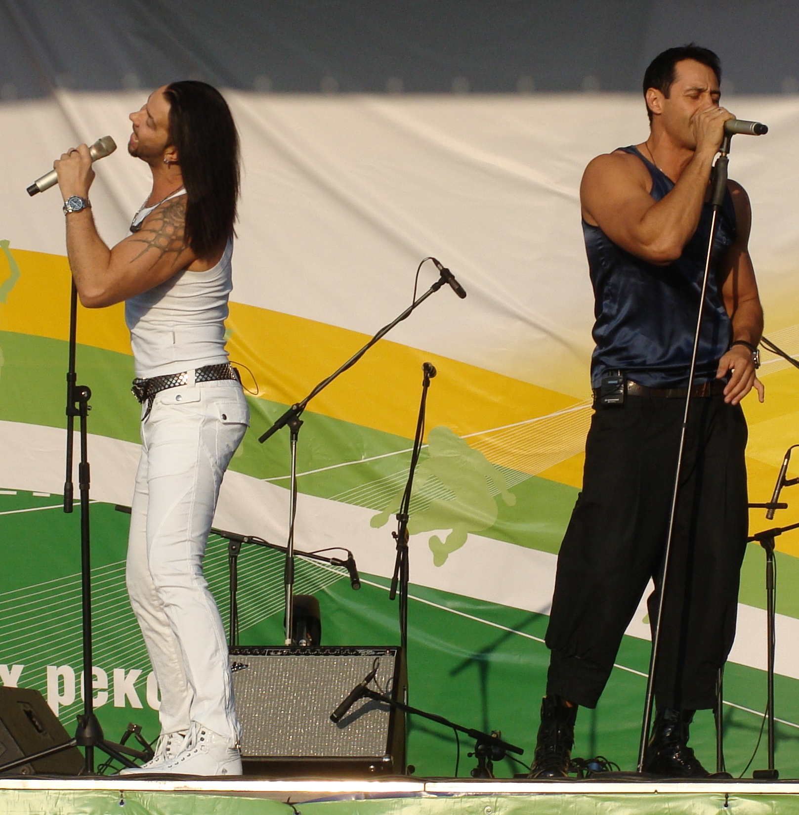 Группа Чай вдвоем на Илимпиаде в Коряжме, 03.07.2010